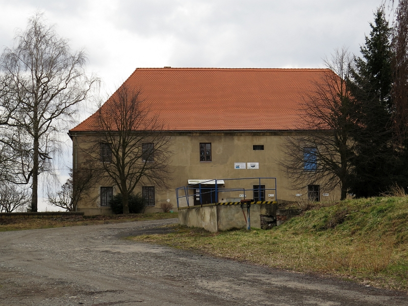 Zámek Bosyně, Bosyně 11, Bosyně.